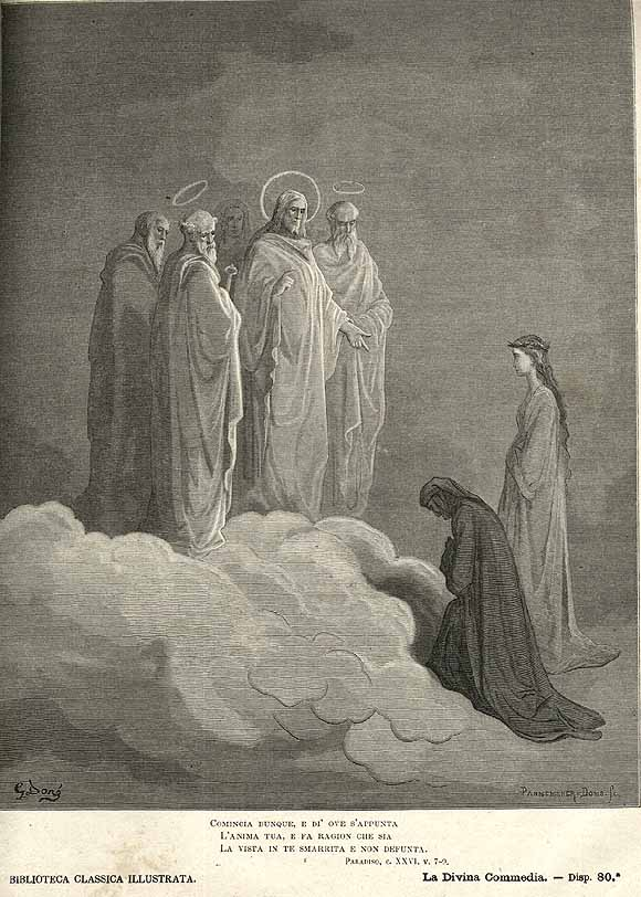 Paradiso by Dante Alighieri Illustration